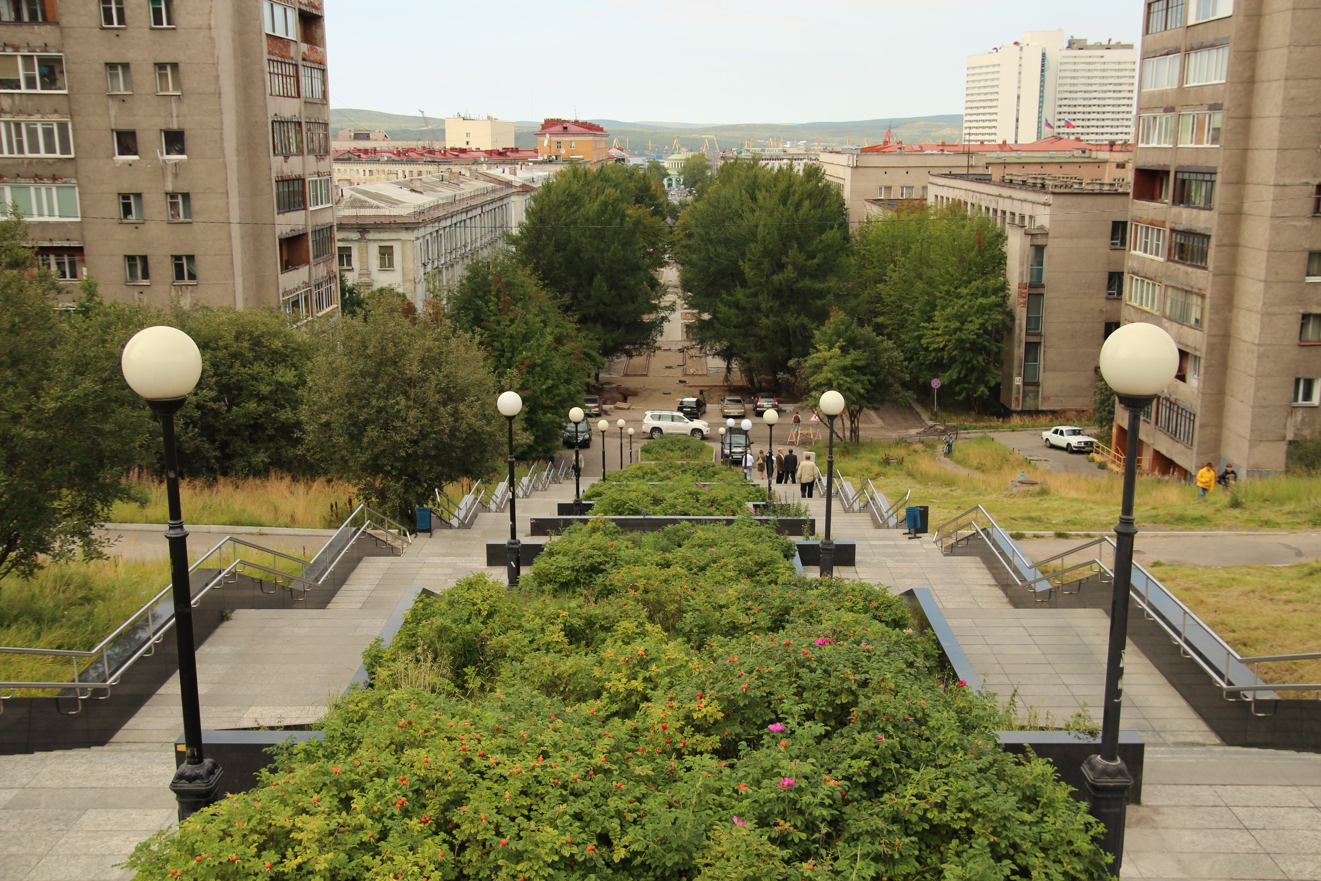 Лестница на Воровского.jpg